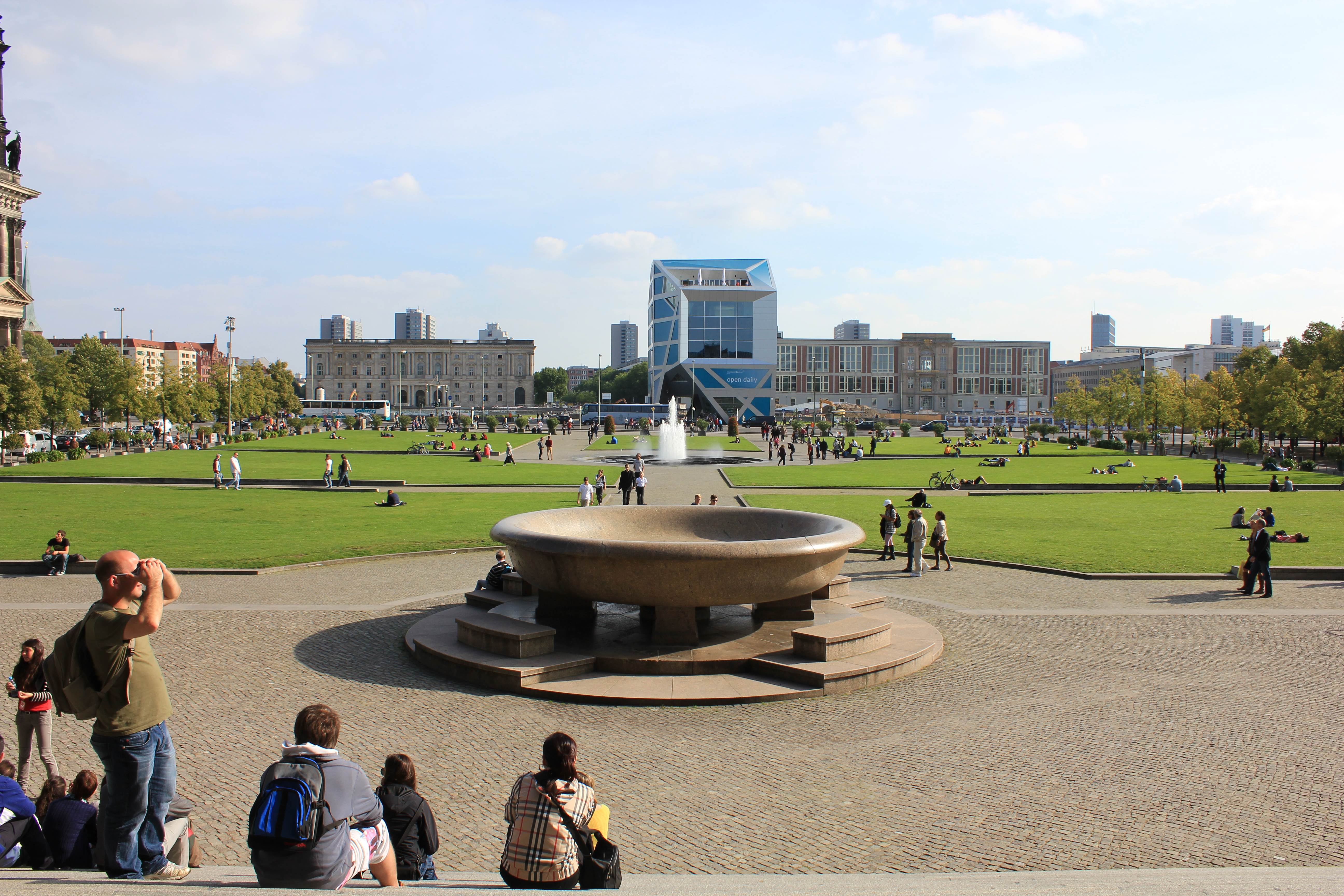 zentrale Ansicht